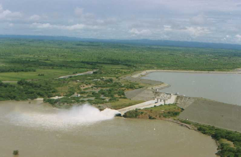 Represa de Poechos, en el río Chira, en el norte del Perú